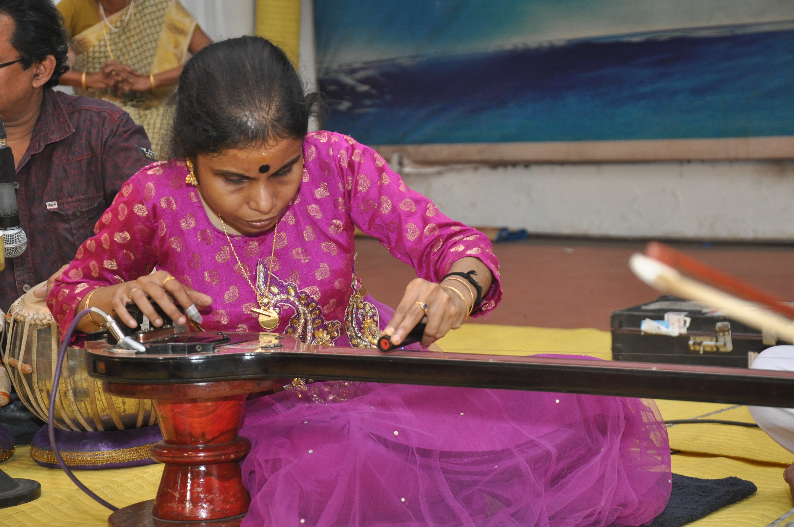 വൈക്കം വിജയലക്ഷ്മി ഗായത്രിവീണ വായിക്കുന്നു.